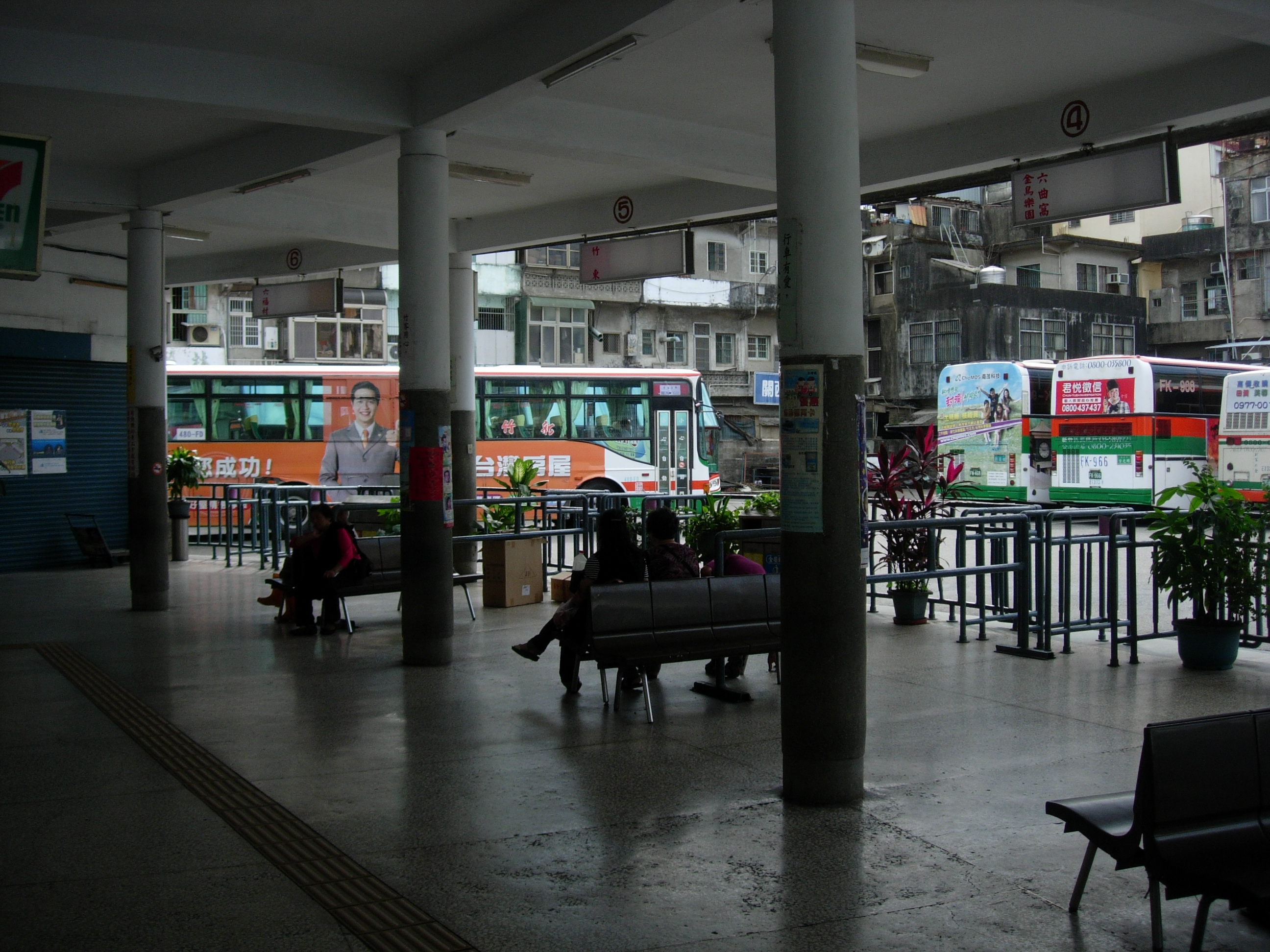 中文（台灣）: 新竹客運關西站月台2